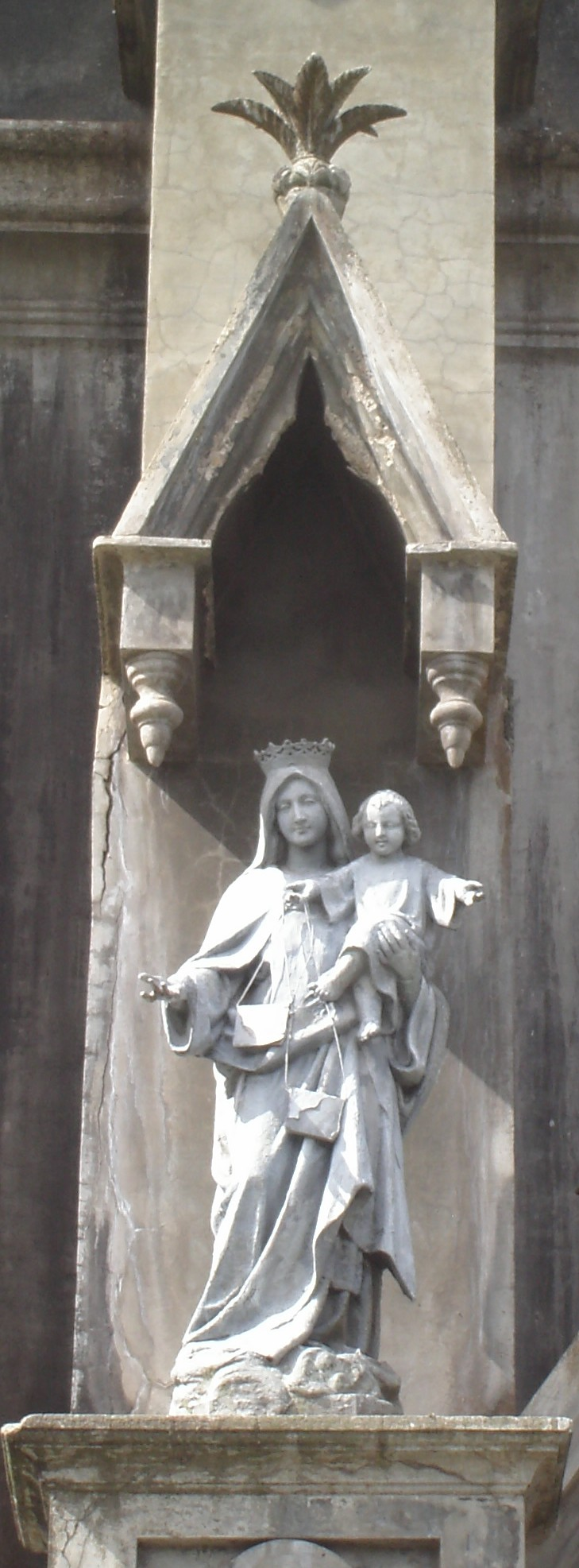 Niche on the front of gothic Coronado Church in Costa Rica. Sculpture by costarican artist Néstor Zeledón Varela. Taken on April 29th, 2007. / Este nicho es uno de los 6 que se encuentran en la fachada de la iglesia neogótica en San Isidro de Vasquez de Coronado, en San José, Costa Rica. La escultura fue elaborada por el artista costarricense Néstor Zeledón Varela para adornar este templo terminado en 1935. Florones como el que se observa en la parte superior también coronan la aguja central de la iglesia y los otros nichos en la fachada y los costados de la parroquia. Fotografía tomada el 29 de abril de 2007.